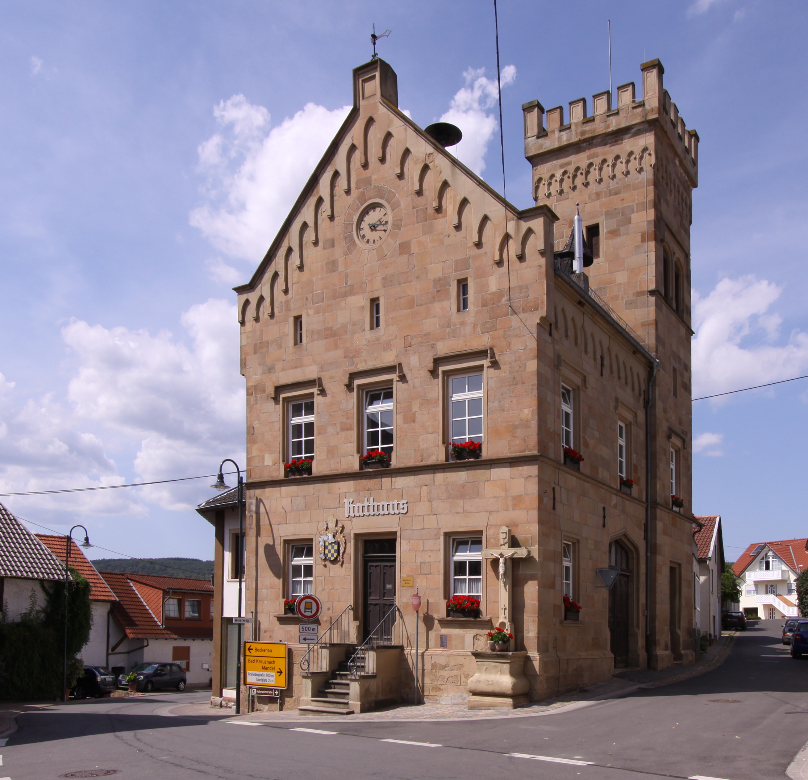 Sponheim bei Bad Kreuznach/Deutschland - Rathaus aus dem 19. Jahrhundert